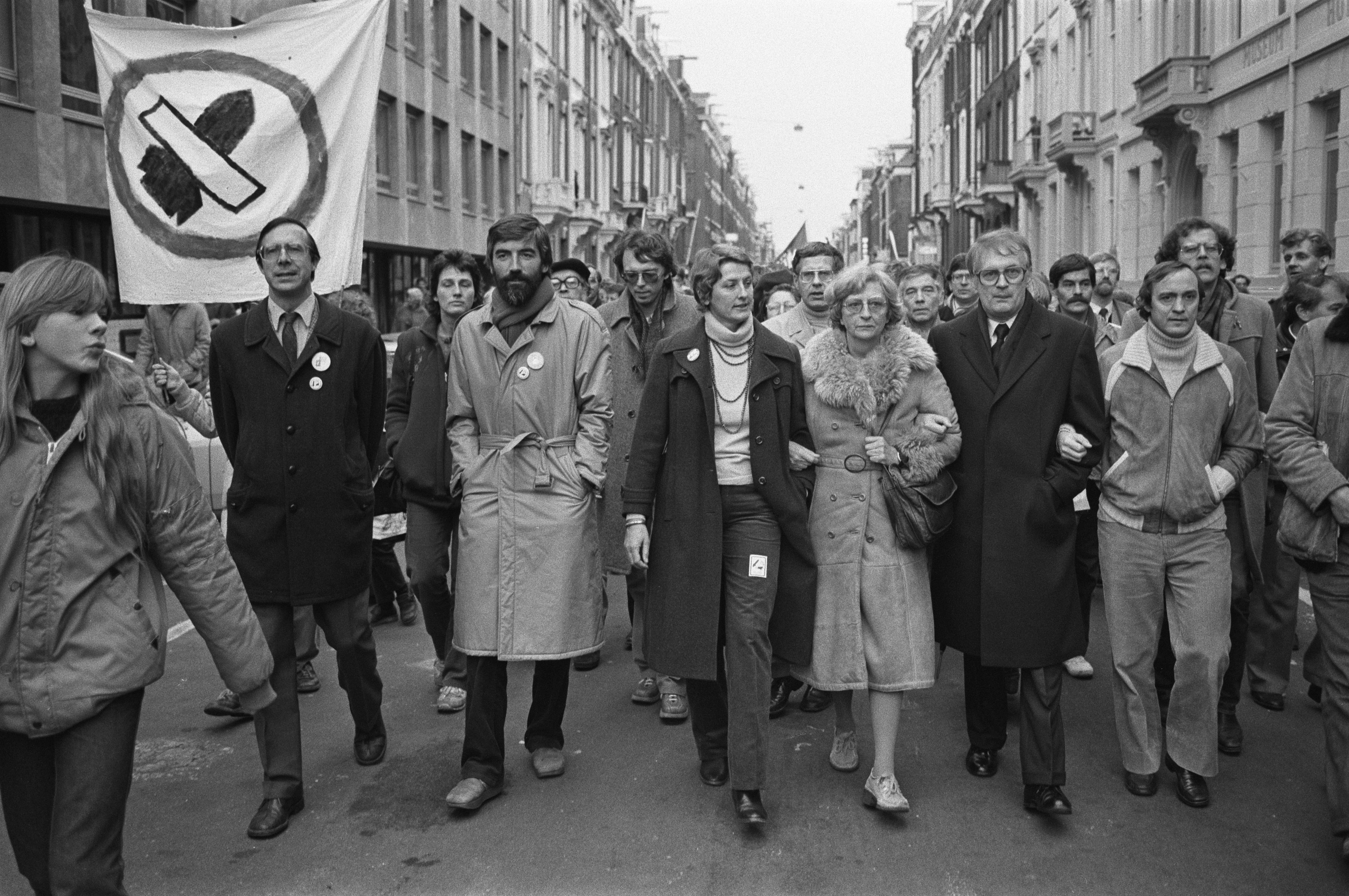 Collectie / Archief : Fotocollectie Anefo Reportage / Serie : Vredesmars in Amsterdam door ongeveer 350.000 mensen tegen de kernbewapening Beschrijving : Voorste rij van links naar rechts Laurens Jan Brinkhorst (D66), Max van den Berg (PvdA), Ria Beckers (PPR), Liesbeth den Uyl (PvdA), Wim Meyer (PvdA), en Karel van Miert (Socialistische Partij Vlaanderen) lopen ook mee Datum : 21 november 1981 Locatie : Amsterdam, Noord-Holland Trefwoorden : politici, vredesdemonstraties Persoonsnaam : Beckers, Ria, Berg, Max van den, Brinkhorst, Laurens Jan, Meyer, Wim, Miert, Karel van, Uyl, Liesbeth den Fotograaf : Croes, Rob C. / Anefo Auteursrechthebbende : Nationaal Archief Materiaalsoort : Negatief (zwart/wit) Nummer archiefinventaris : bekijk toegang 2.24.01.05 Bestanddeelnummer : 931-8149